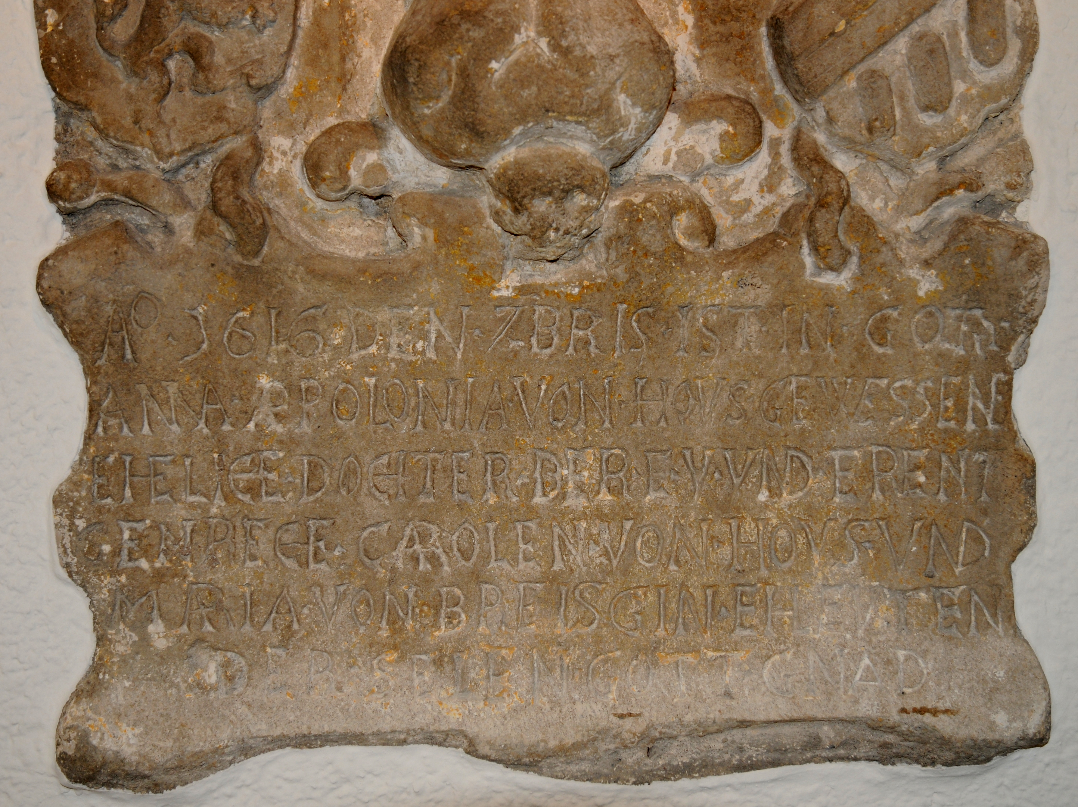 Epitaph vum Bëbee Anna Appolonia Housse an der Kierch zu Schengen.